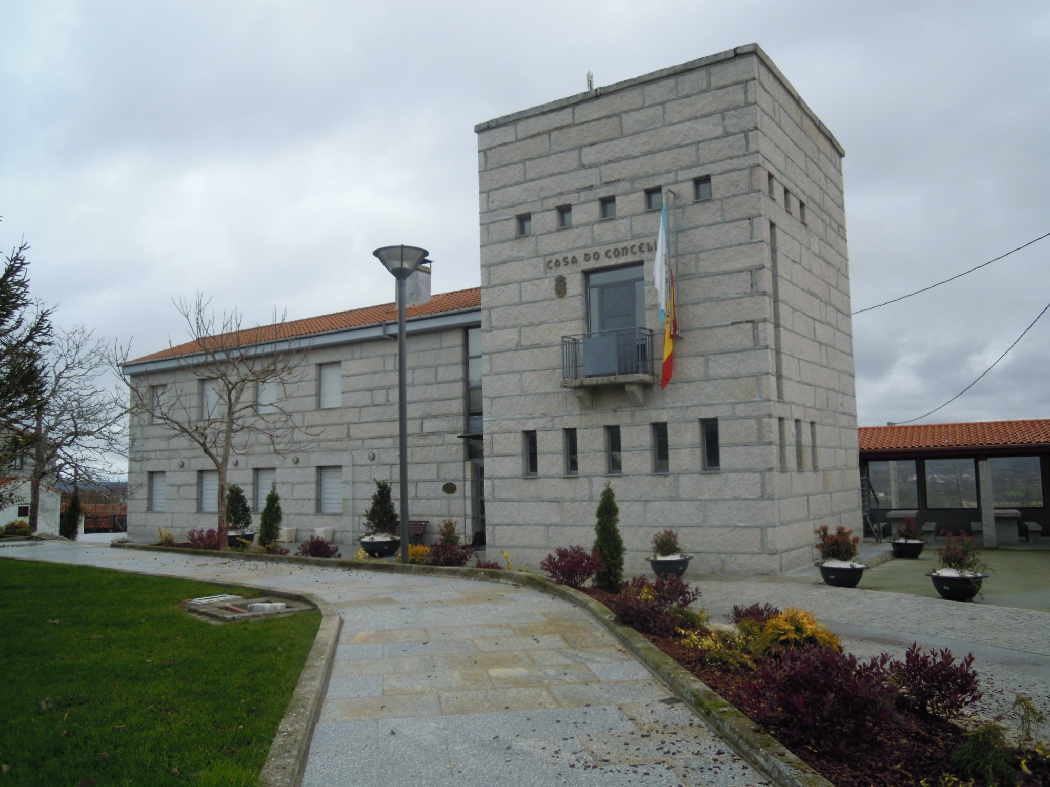 Casa consistorial de Calvos de Randín